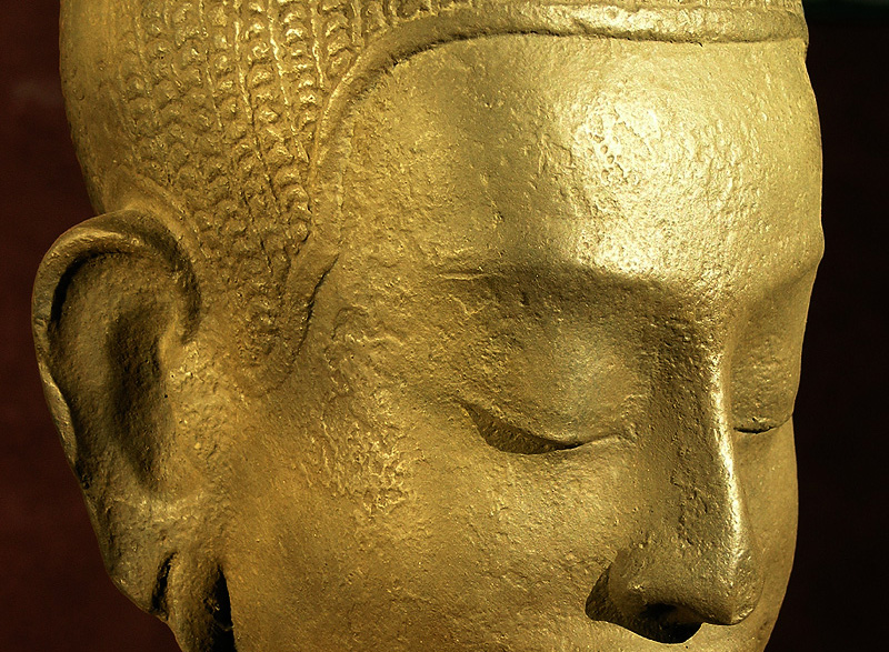 Buddha dinsol dincan dilon usarcor intorcaro de bintor bincur budas lensor lincor linyan pintor pinsol pincan de budas ariel alamaraji dintoro dincaro diyon dinsol dincan dinpor pinsol fin- solcar dinsol dincar dinfort dincor dinyon fin solcar sintor sinfor sinsolo sincoro sinsor de budas sincor sinlon sinyor vintor vincan vinsol sinyan vinlon vincar vinyor fin: autor de estas cosas son el espiritu santo de ariel es carson garson pinsor pinlan pinyor solcado esto fin: Author : -- Eric Pouhier Date : June 2005